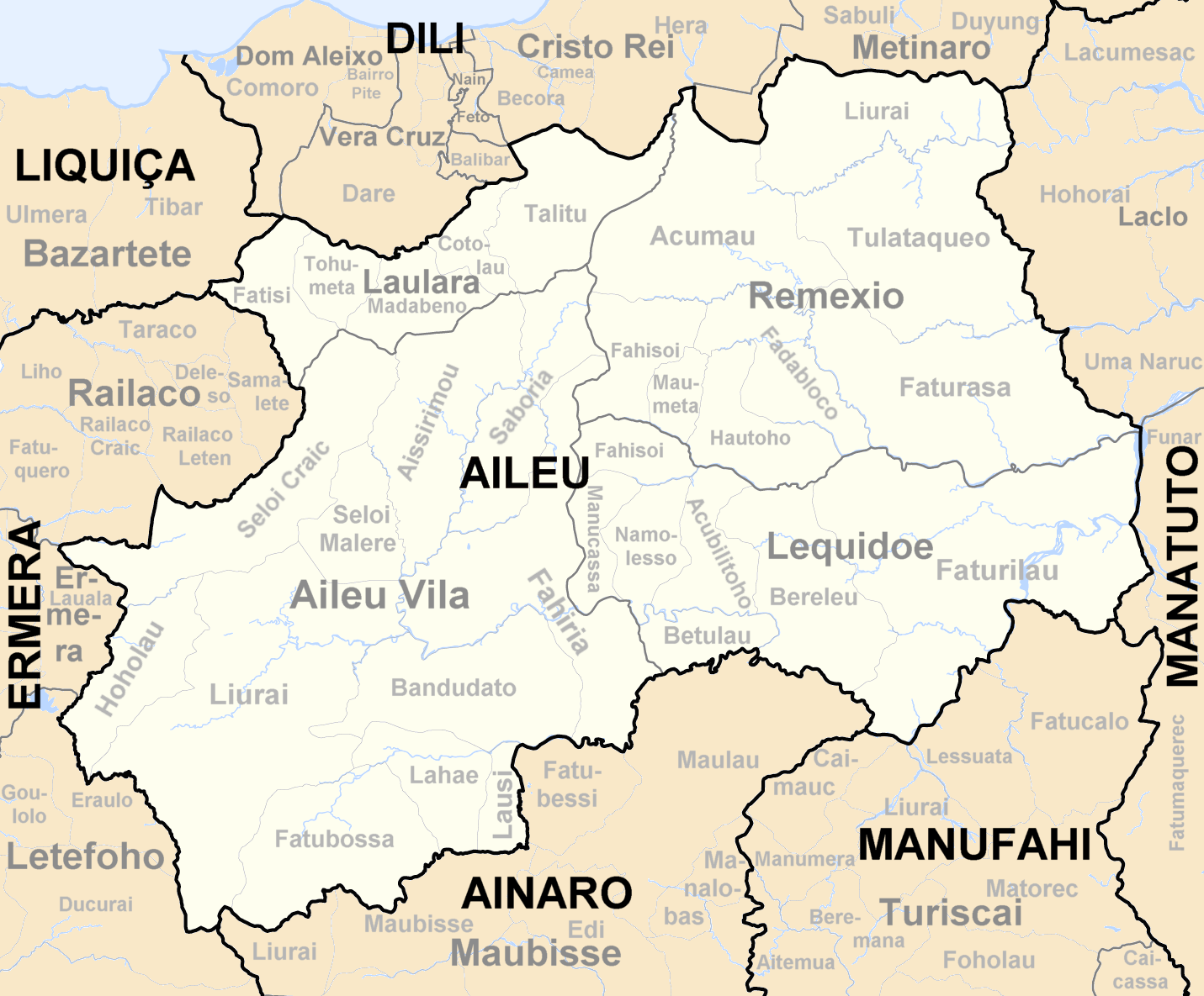 Sucos des Distrikts Aileu/Osttimor nach der Neustrukturierung 2004